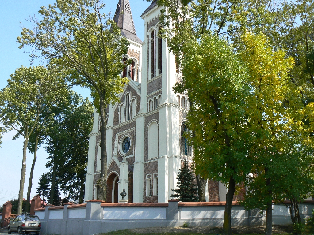 Zabytkowy kościół pw. Wszystkich Świętych w Grocholicach (Bełchatów) - wejście główne.